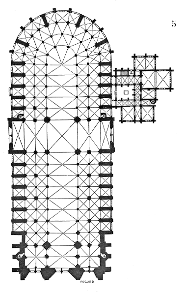 Dérivée de File:Plan.cathedrale.Paris pour retrouver l’orientation originale dans le Dictionnaire raisonné de l’architecture française du XIe au XVIe siècle